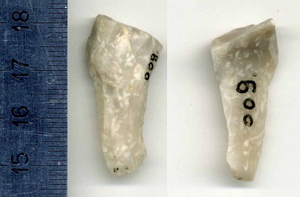 Rdzeń